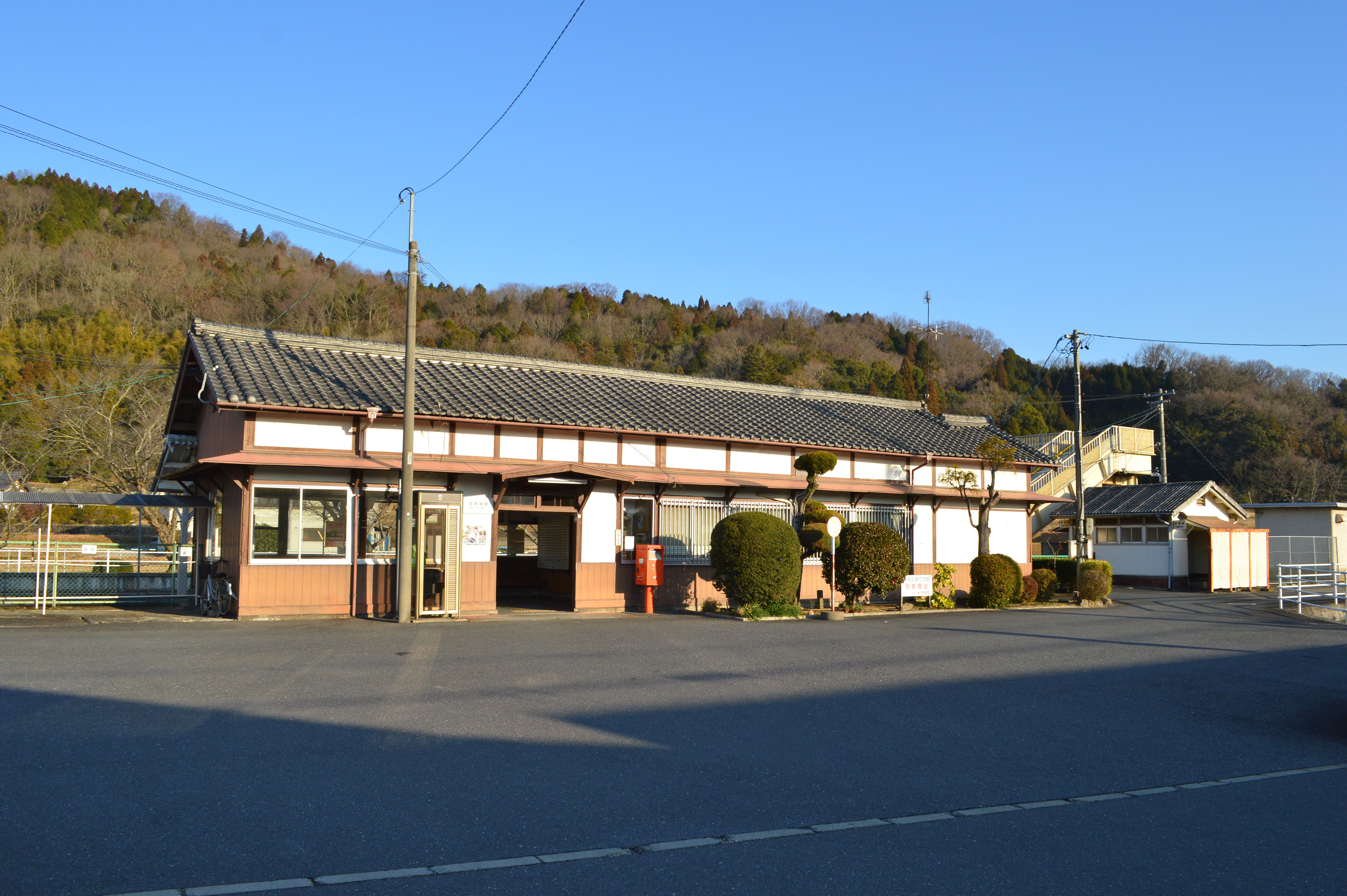 佐那具駅 駅舎